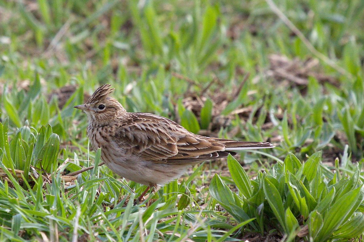 Feldlerche im Frühling, Brutvogel im NSG Bislicher Insel